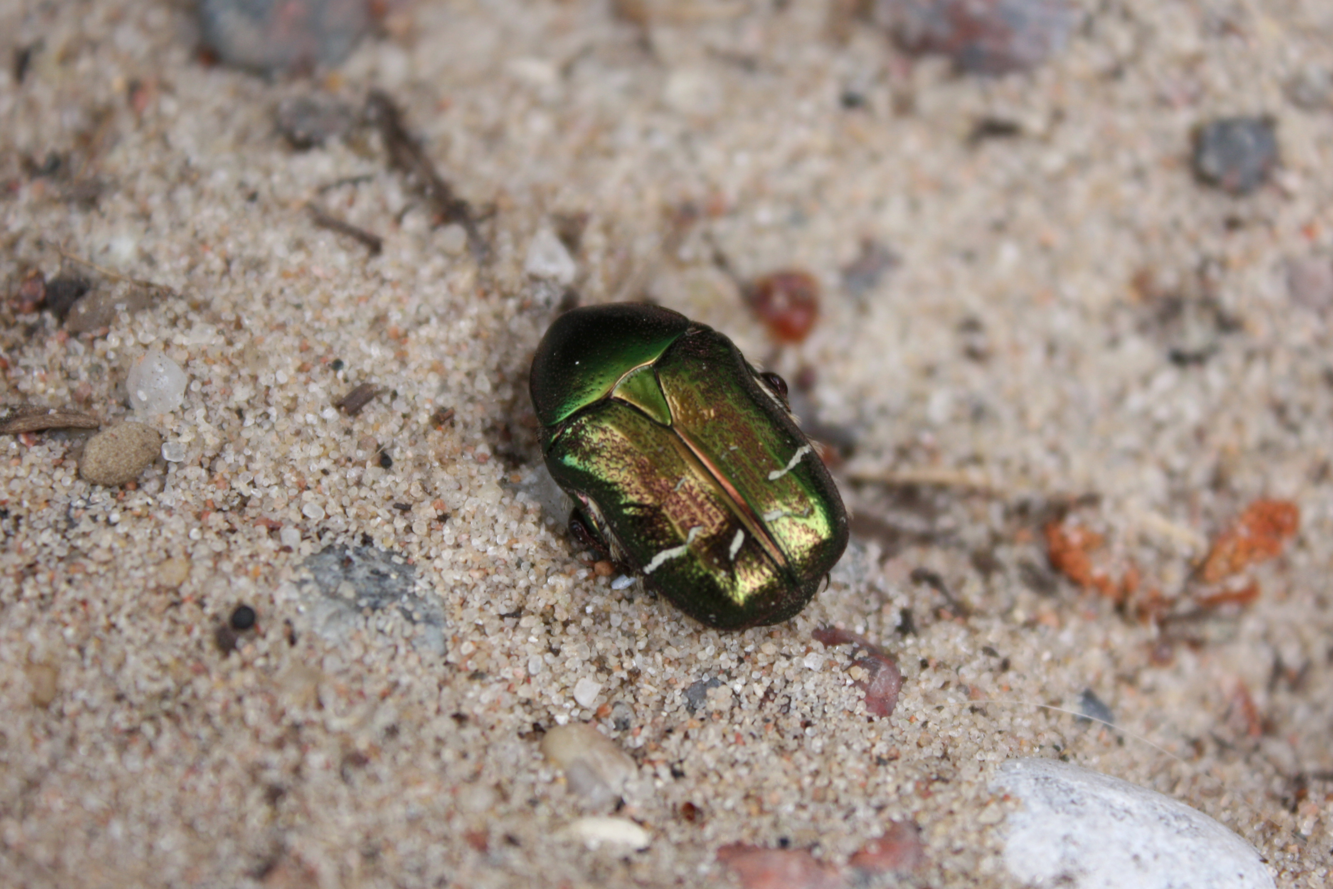 Rose chafer in Gotska Sandön